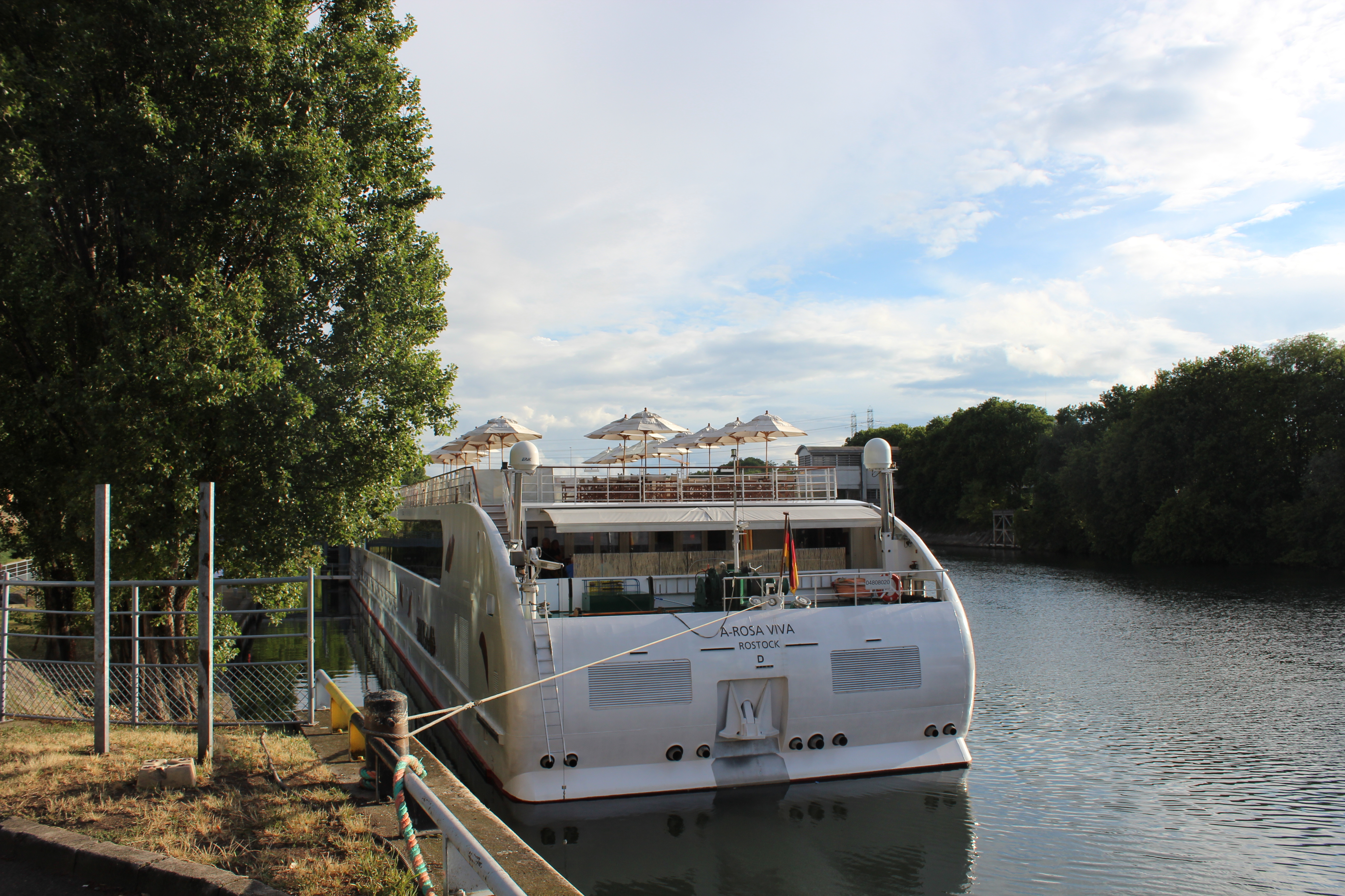 Flusskreuzfahrschiff A-Rosa Viva, Fahrgebiet auf der Seine. Hier an der Anlegestelle in Saint-Denis, Quai de St. Quen